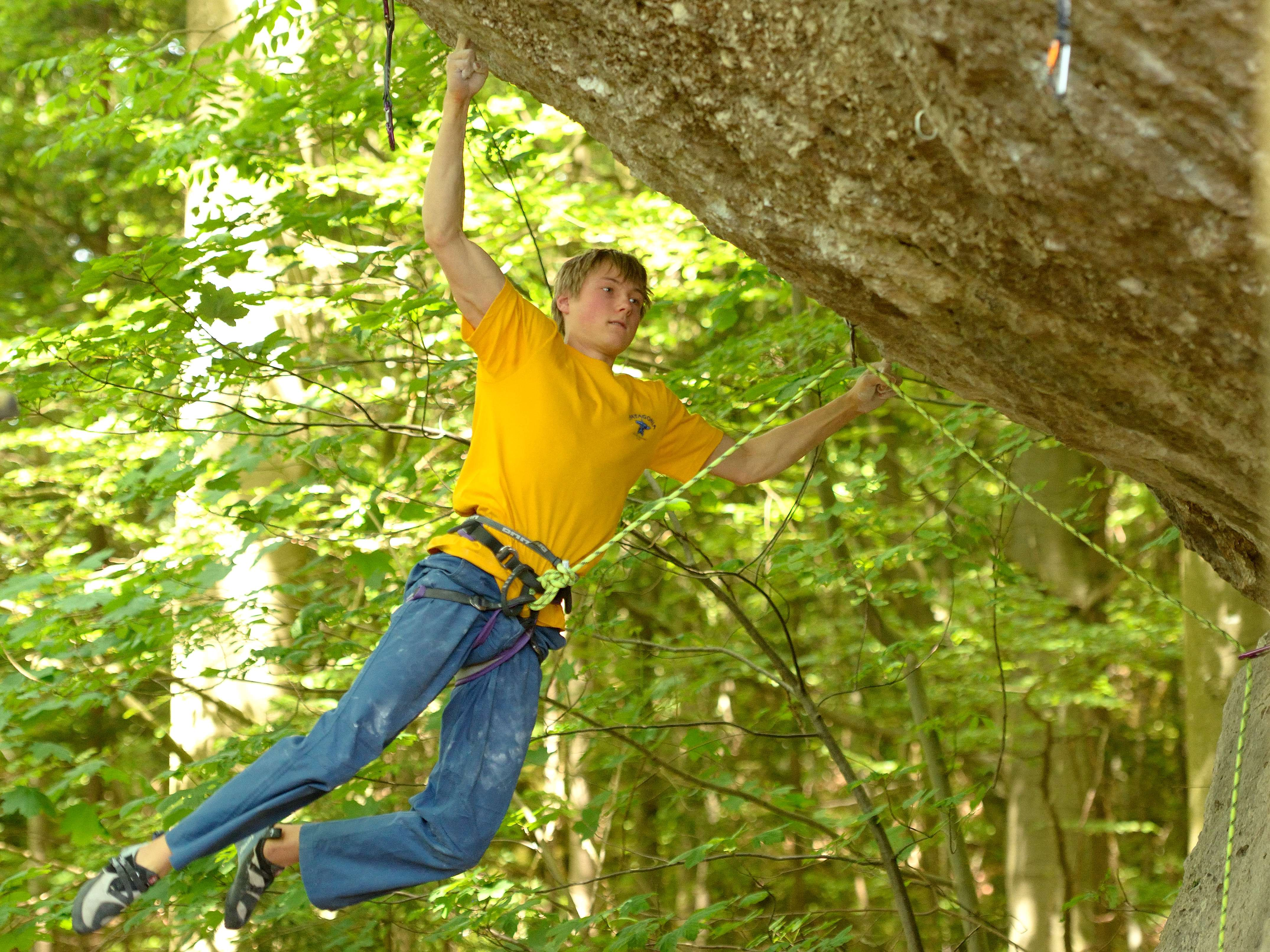 Alexander Megos in “Action Directe“ am Waldkopf, Nördlicher Frankenjura